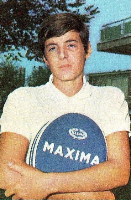 CAMPIONI dello SPORT 1970/71-n.327- PANATTA - TENNIS